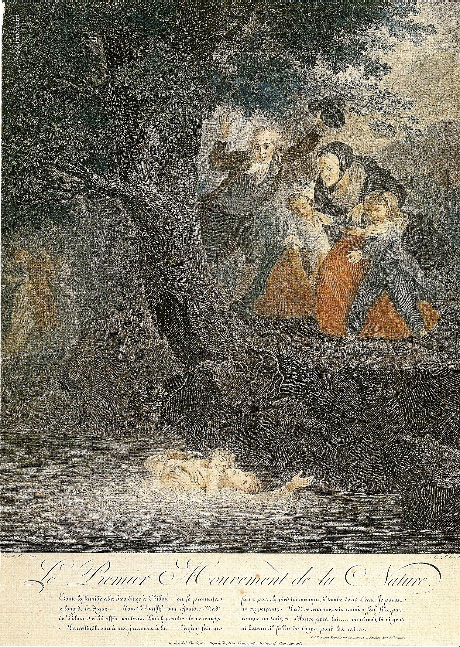 Jean-Jacques Rousseaus Julie oder Die neue Heloise - Julie rettet den Sohn vorm Ertrinken. Stich des 18. Jahrhunderts